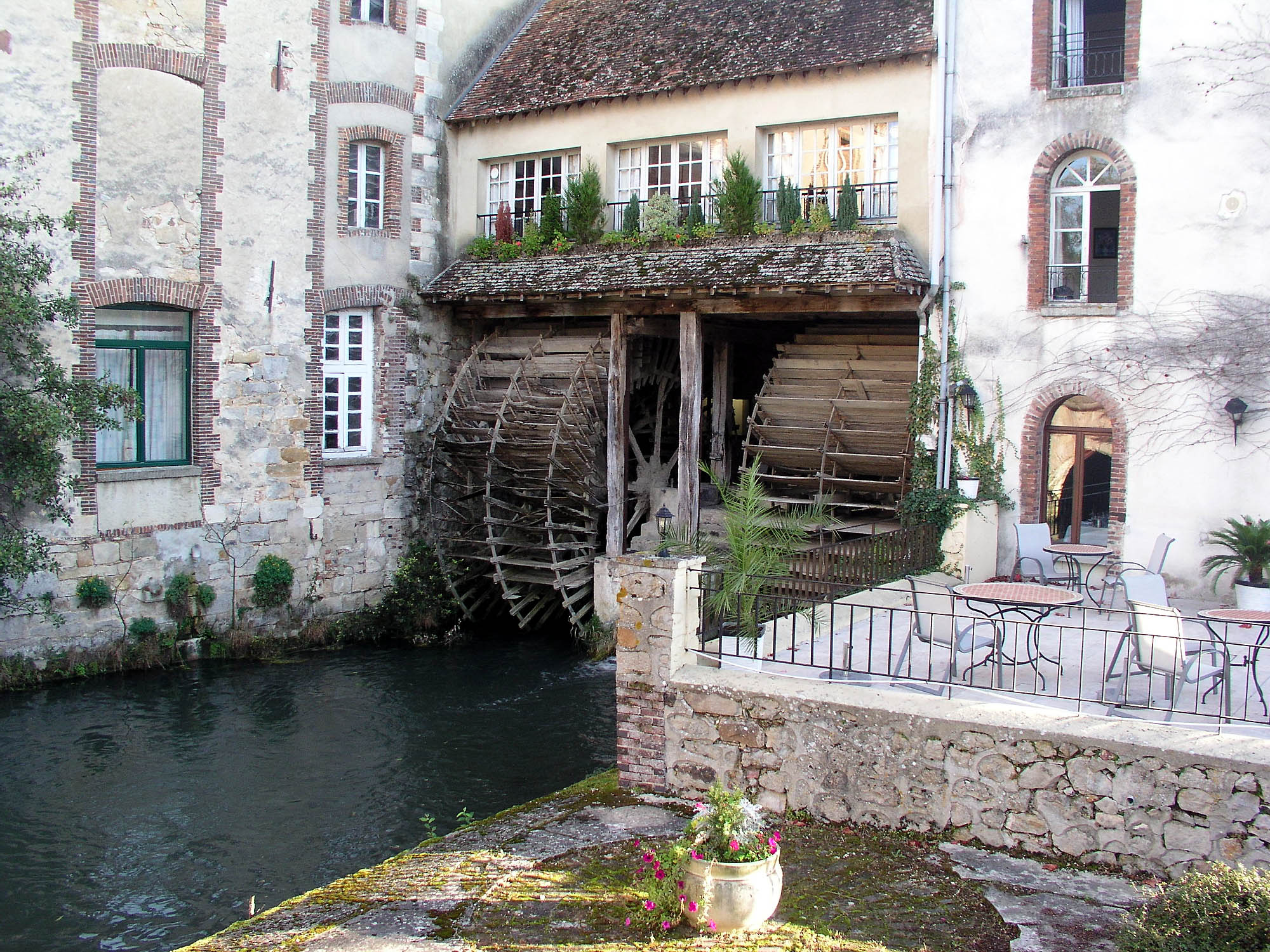 Moulins banaux sur la Vanne à Villeneuve l'Archevêque (Yonne France)